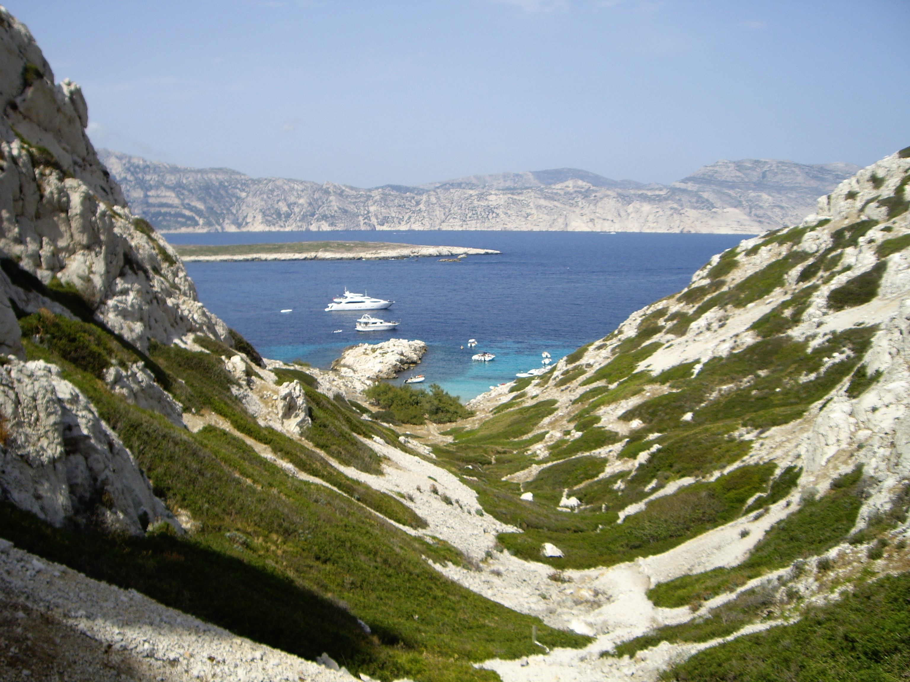 Vue du col de la Culatte, île de Riou, France.